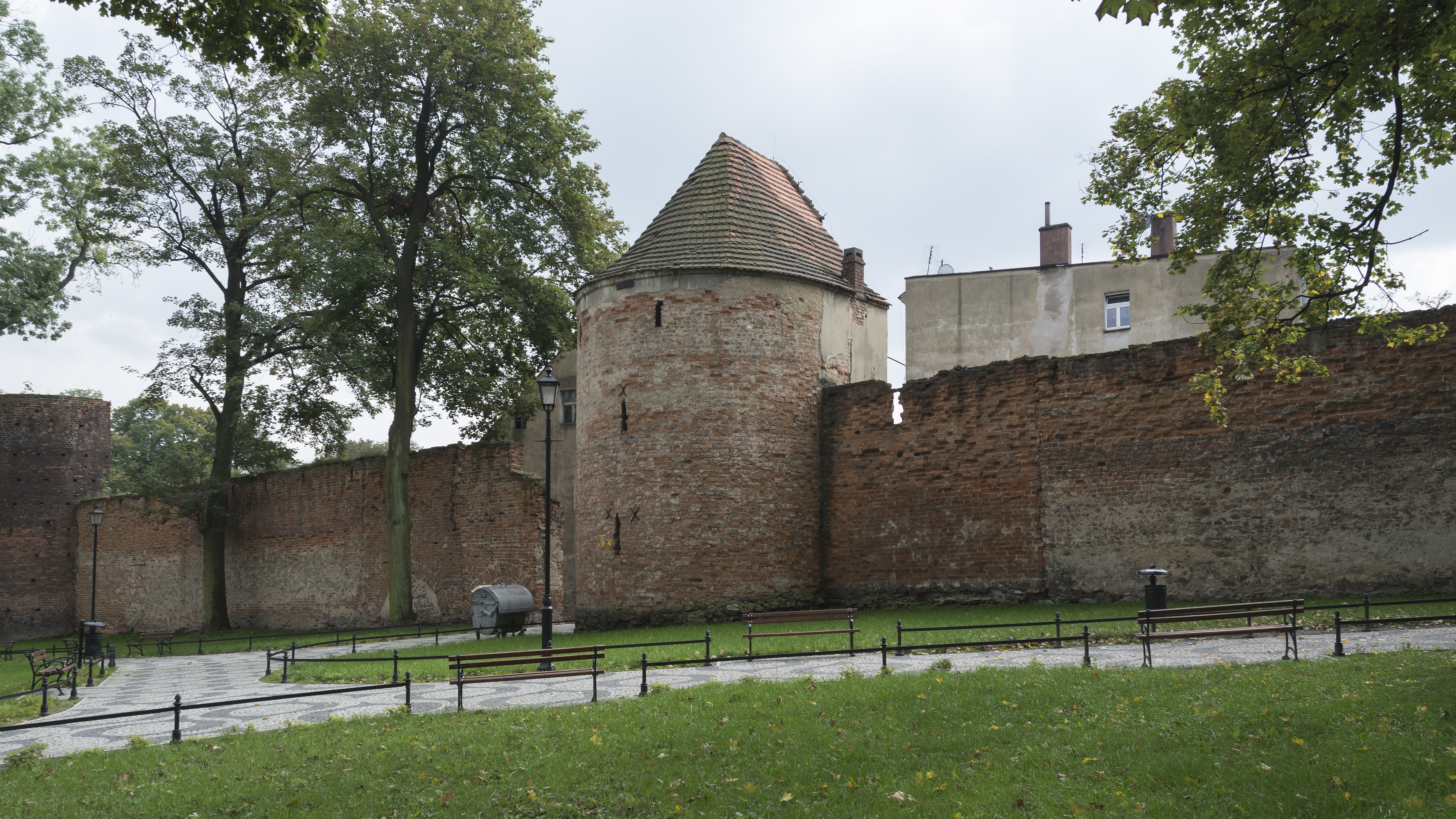 Ząbkowice Śląskie, mury obronne, pocz. XIV, kon. XVI